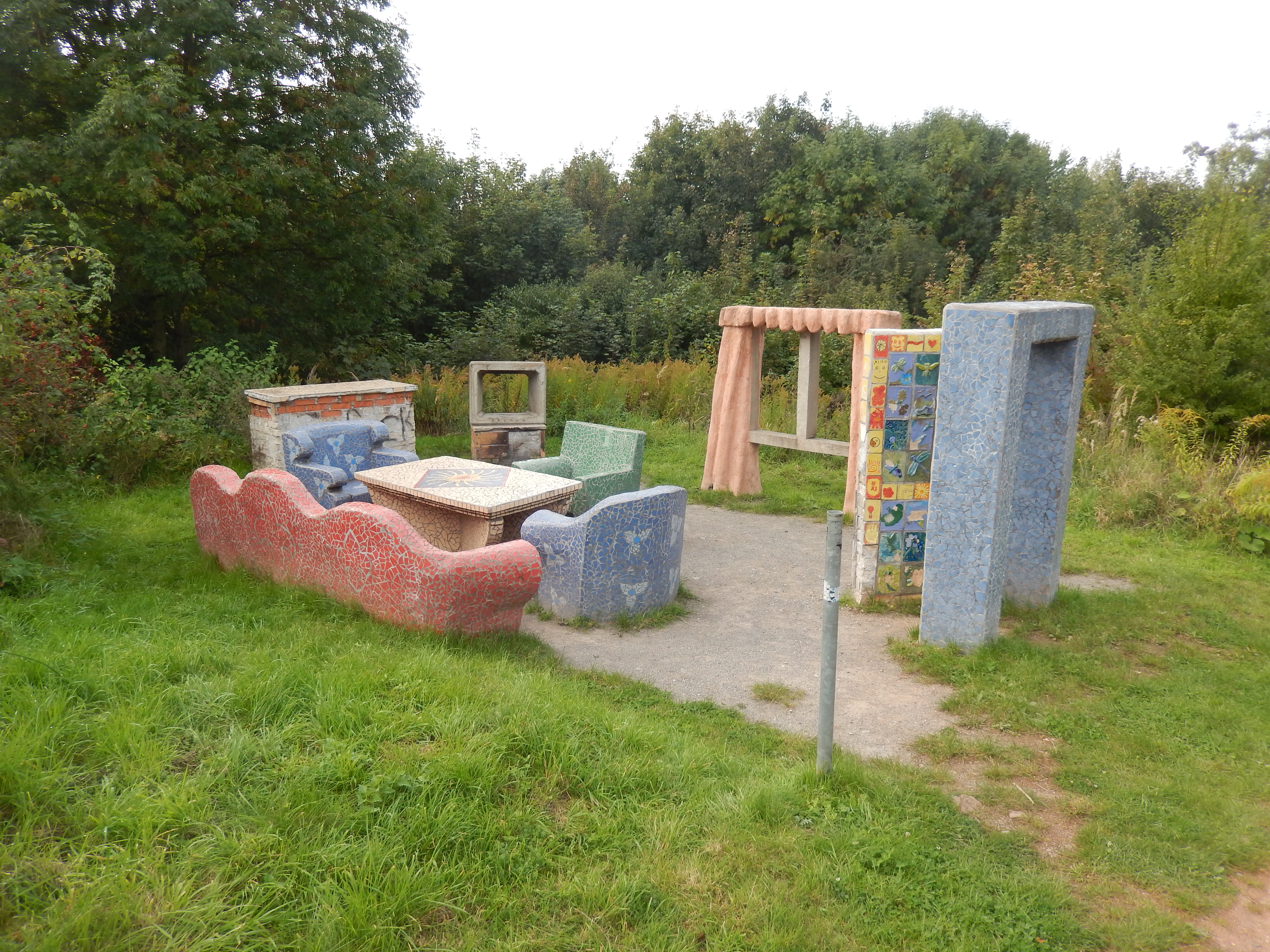 Kunstobjekt "Wohnzimmer im Freien" im Deisterpark Barsinghausen. Entstanden im Rahmen der Gartenregion Hannover 2009.